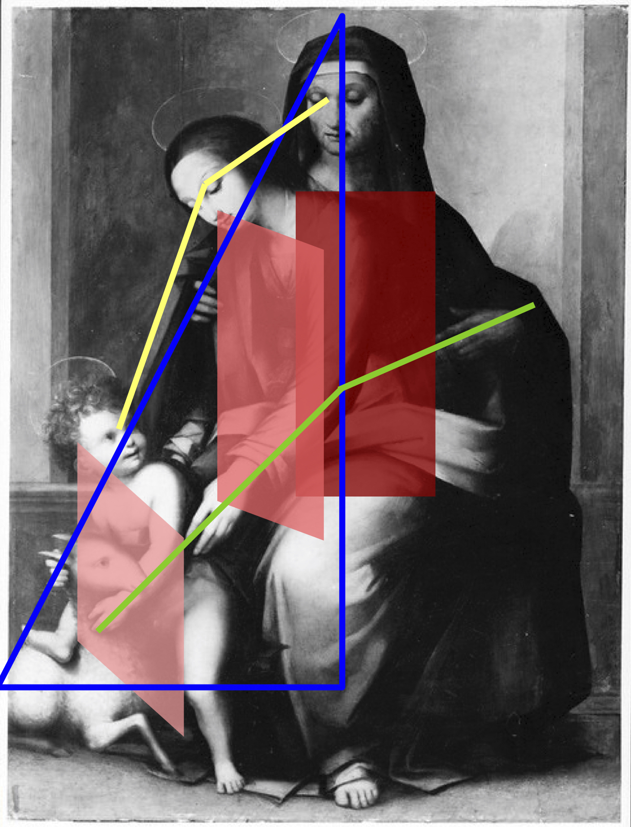 Bleu : triangle dans lequel s'insère la composition ; rouge : orientation des personnages ; vert : lignes des bras ; jaune : lignes des regards